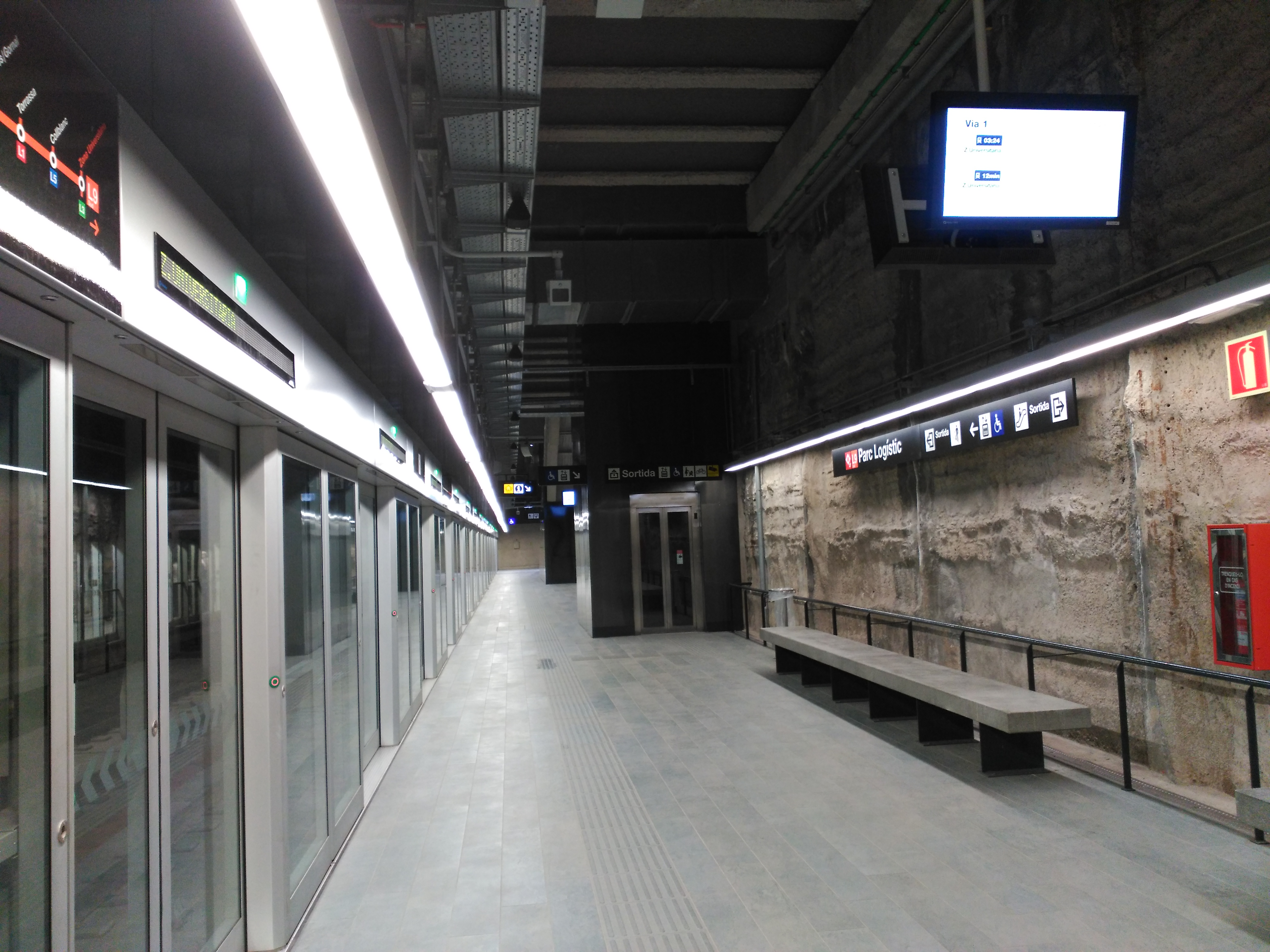 Estació de Parc Logístic